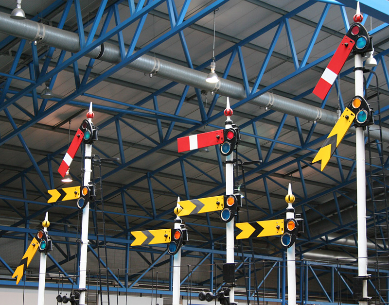 Arouezioù ul linenn e Mirdi Broadel al linenn, Evrog Signalau rheilffordd yn Amgueddfa Genedlaethol y Rheilffordd, Efrog Railway signals at the National Railway Museum, York Sinyow hyns-horn yn Gwithti Kenedhlek an Hyns-horn, Evrek